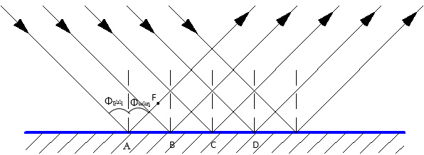 Ռադիոալիքների անդրադարձումը հարթ հաղորդիչ մակերևույթից